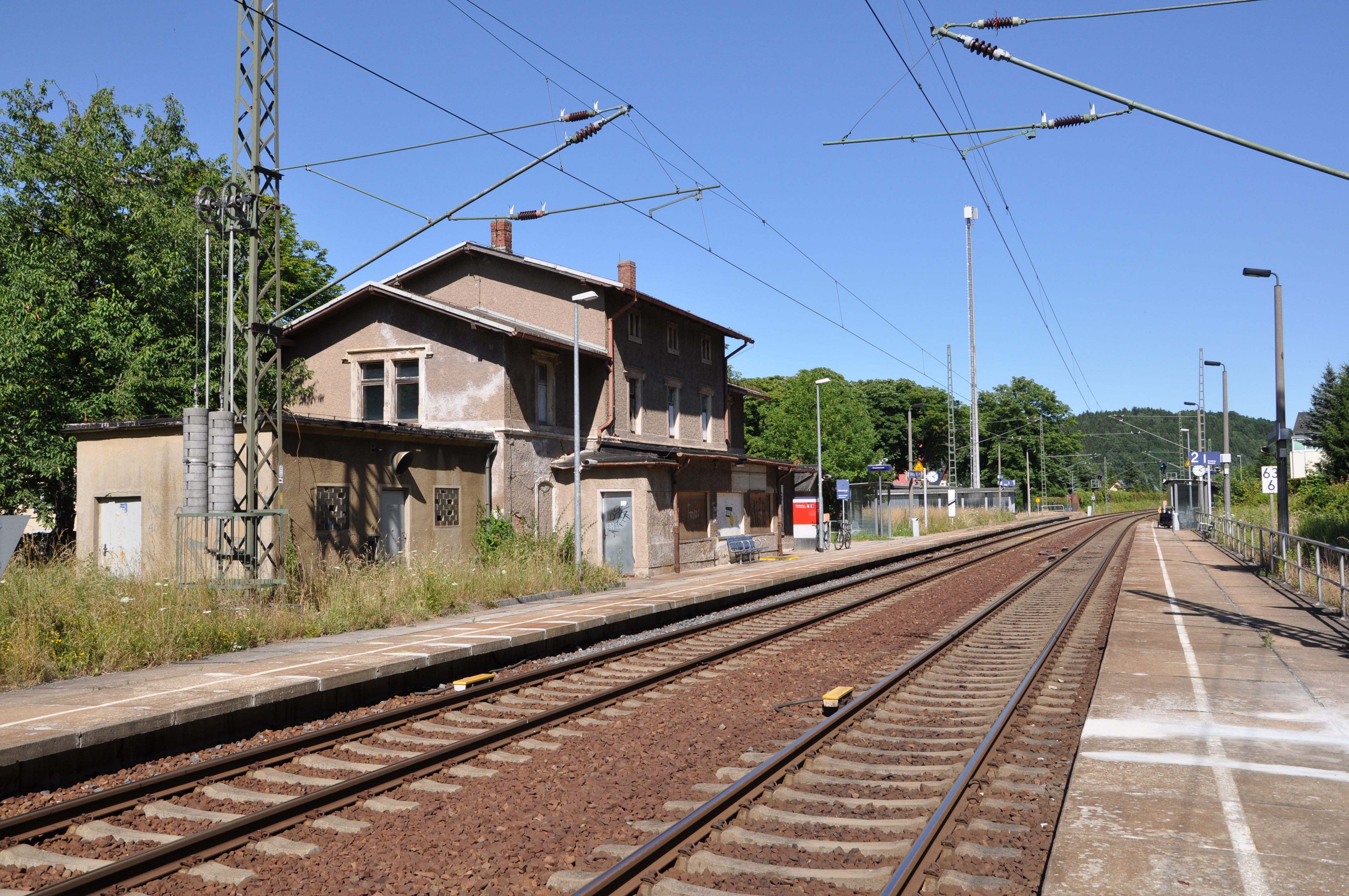 Haltepunkt Falkenau (Sachs) Süd, Bahnstrecke Dresden-Werdau